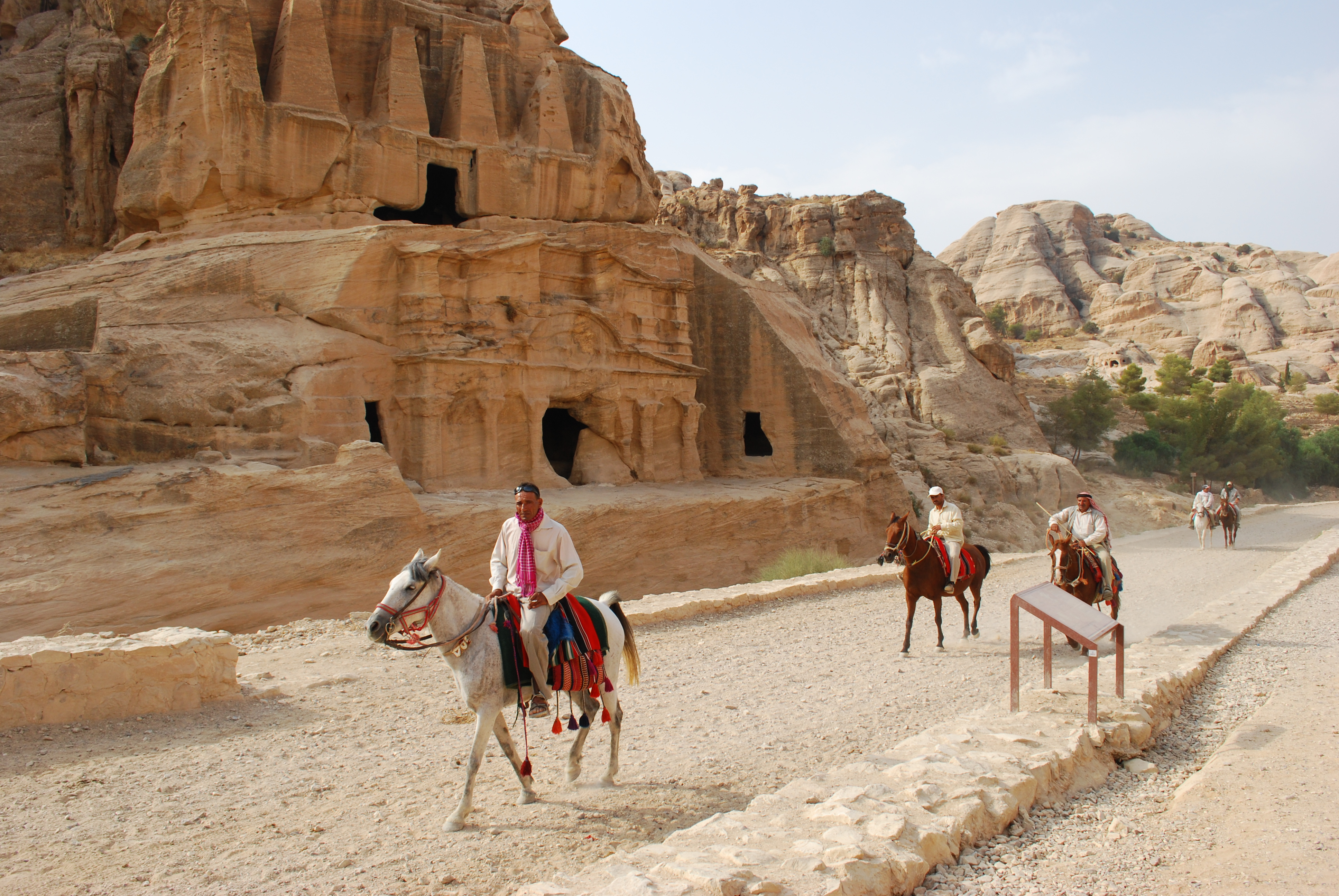 Pétra : la tombe aux obélisques.